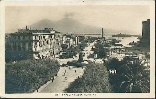 "Napoli - Piazza Municipio" in direzione del porto con faro Lanterna. Autore sconosciuto. Cartolina. Catalogo n° 34.